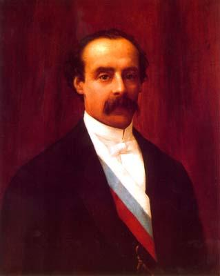 Retrato de José Manuel Balmaceda (1840-1891), presidente de Chile entre 1886 y 1891.